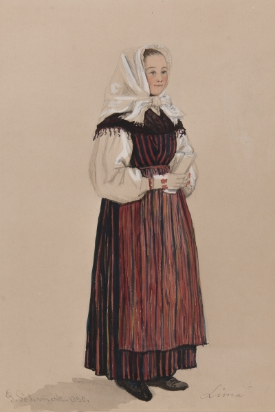 "Lima" . Kvinna i dräkt. Akvarell av P Södermark 1850. Depicted place: Lima socken (Q10561942)